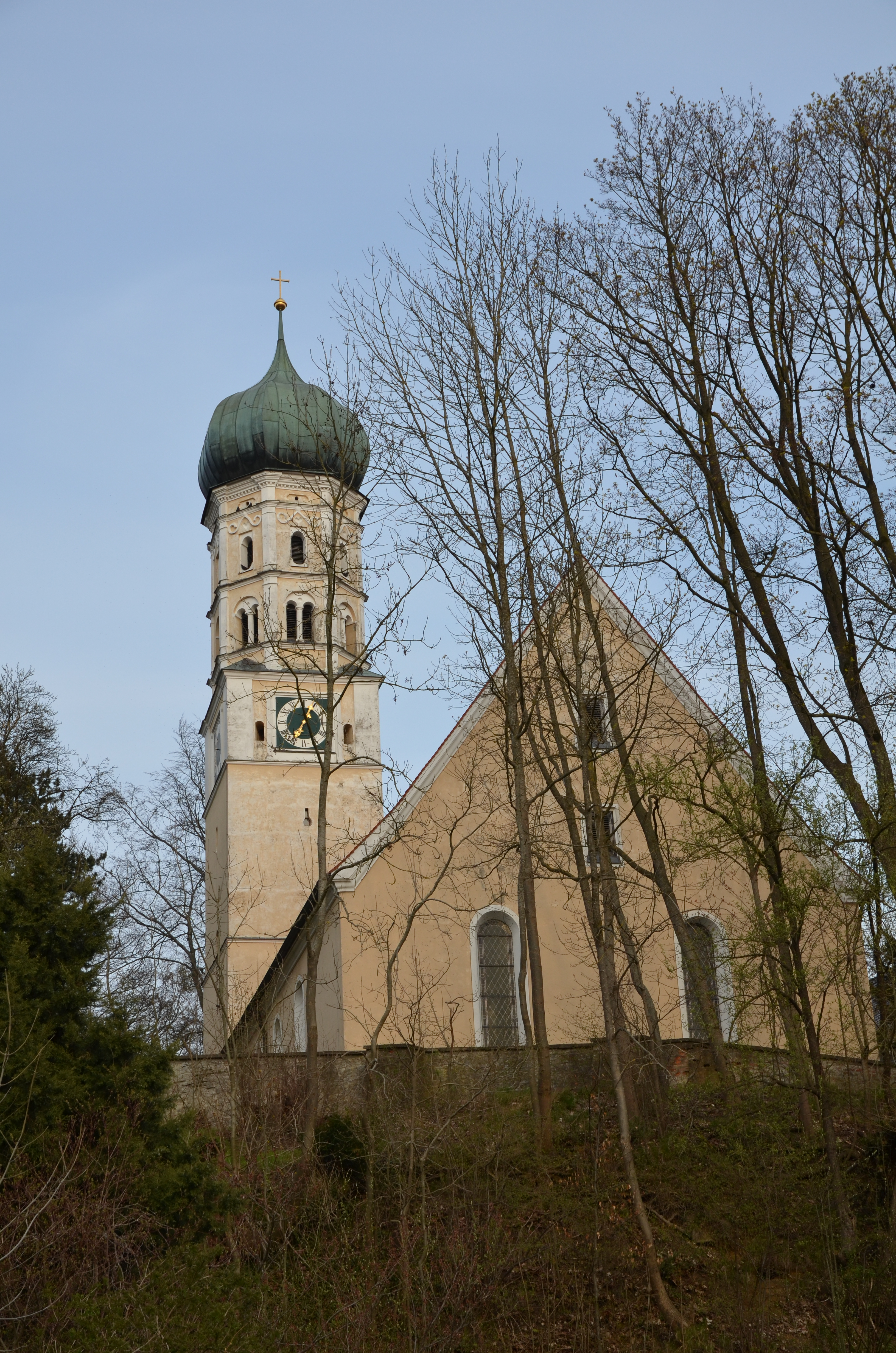 evang.-luth. Johanneskirche in Burtenbach